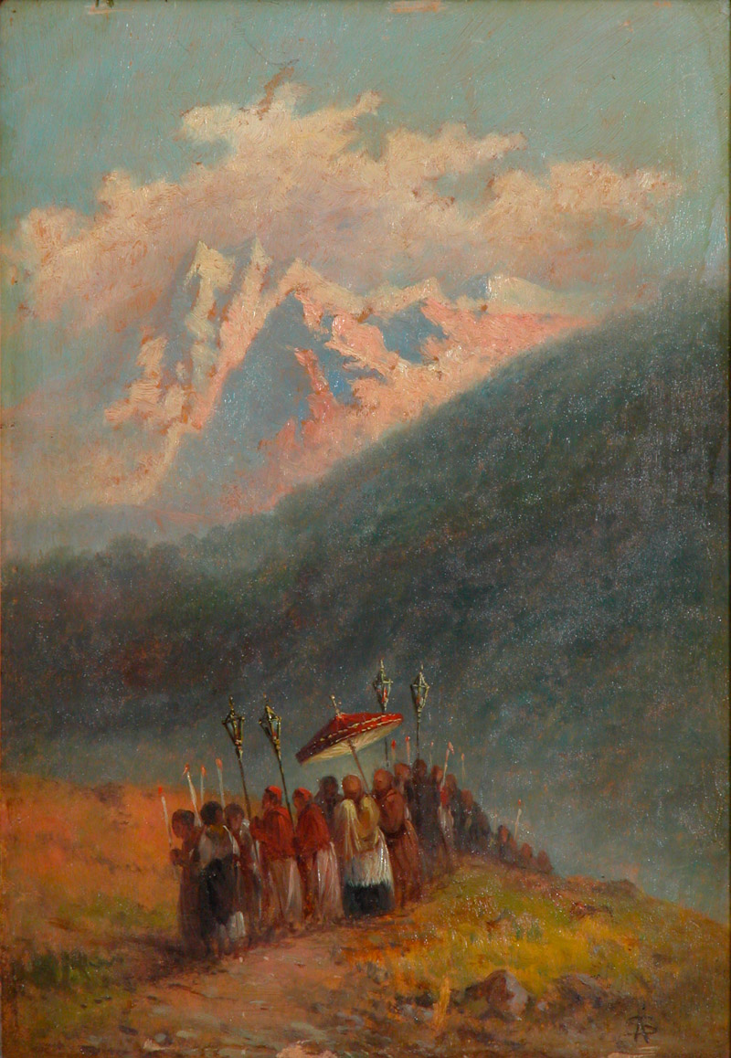 Procesión